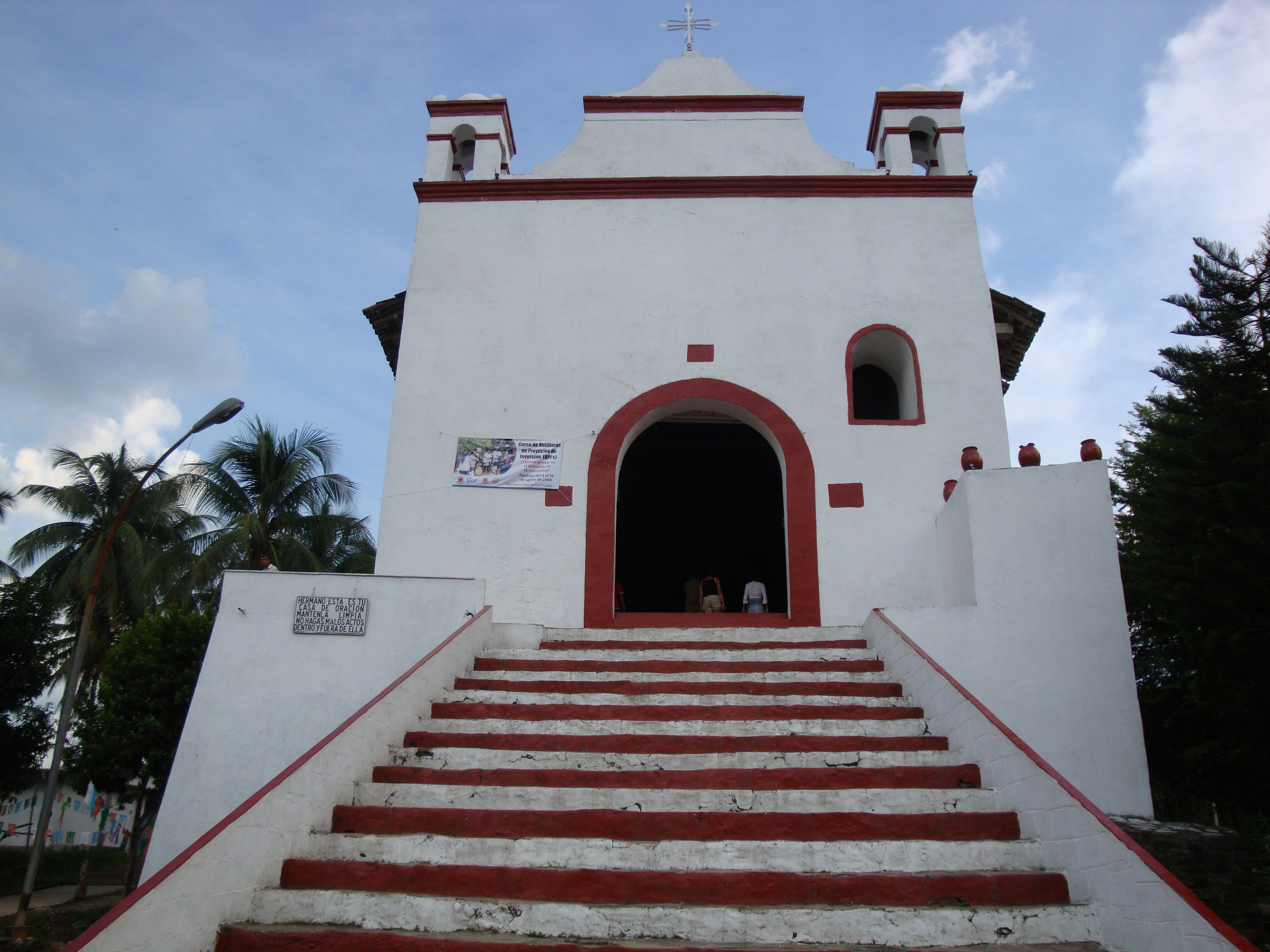 Iglesia de Santiago Apostol, en villa Tapijulapa, Tabasco.